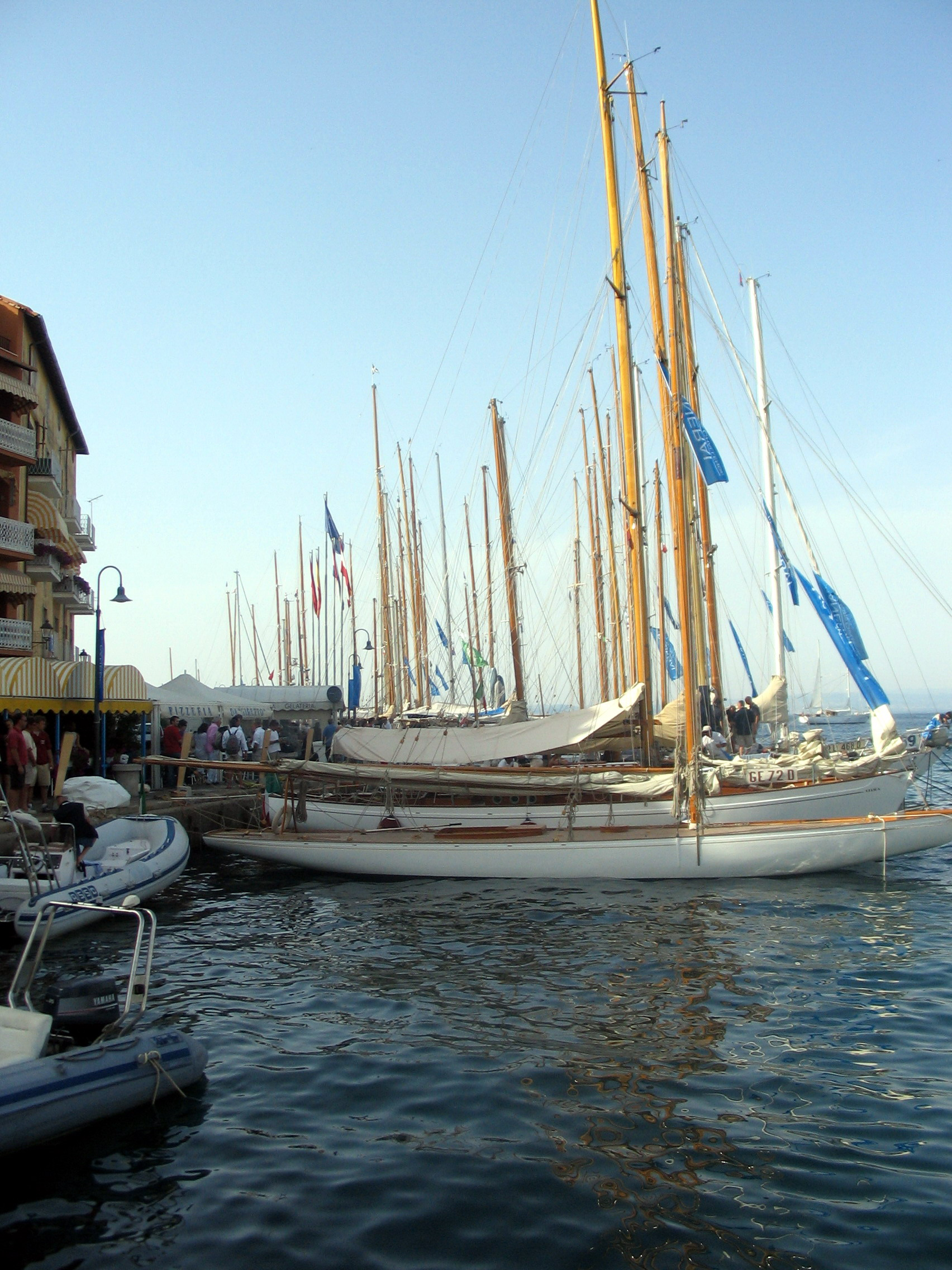 Porto Santo Stefano, Toscana, Italia